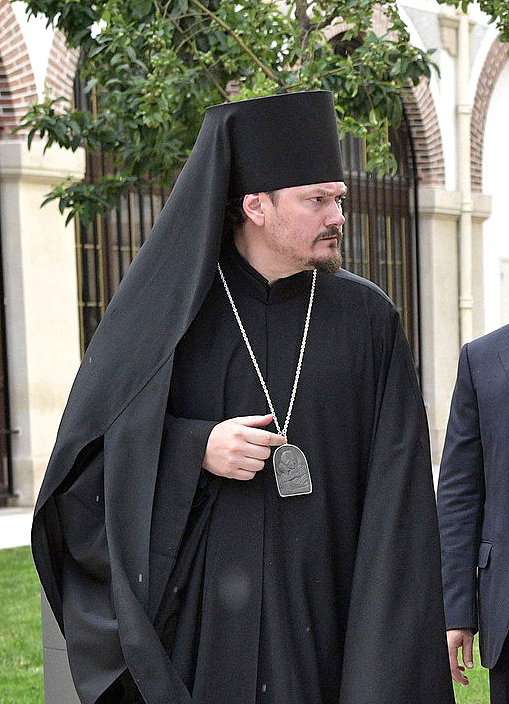 Епископ Нестор сопровождает Президента России Владимира Путина во время посещения Российского духовно-культурного центра в Париже.